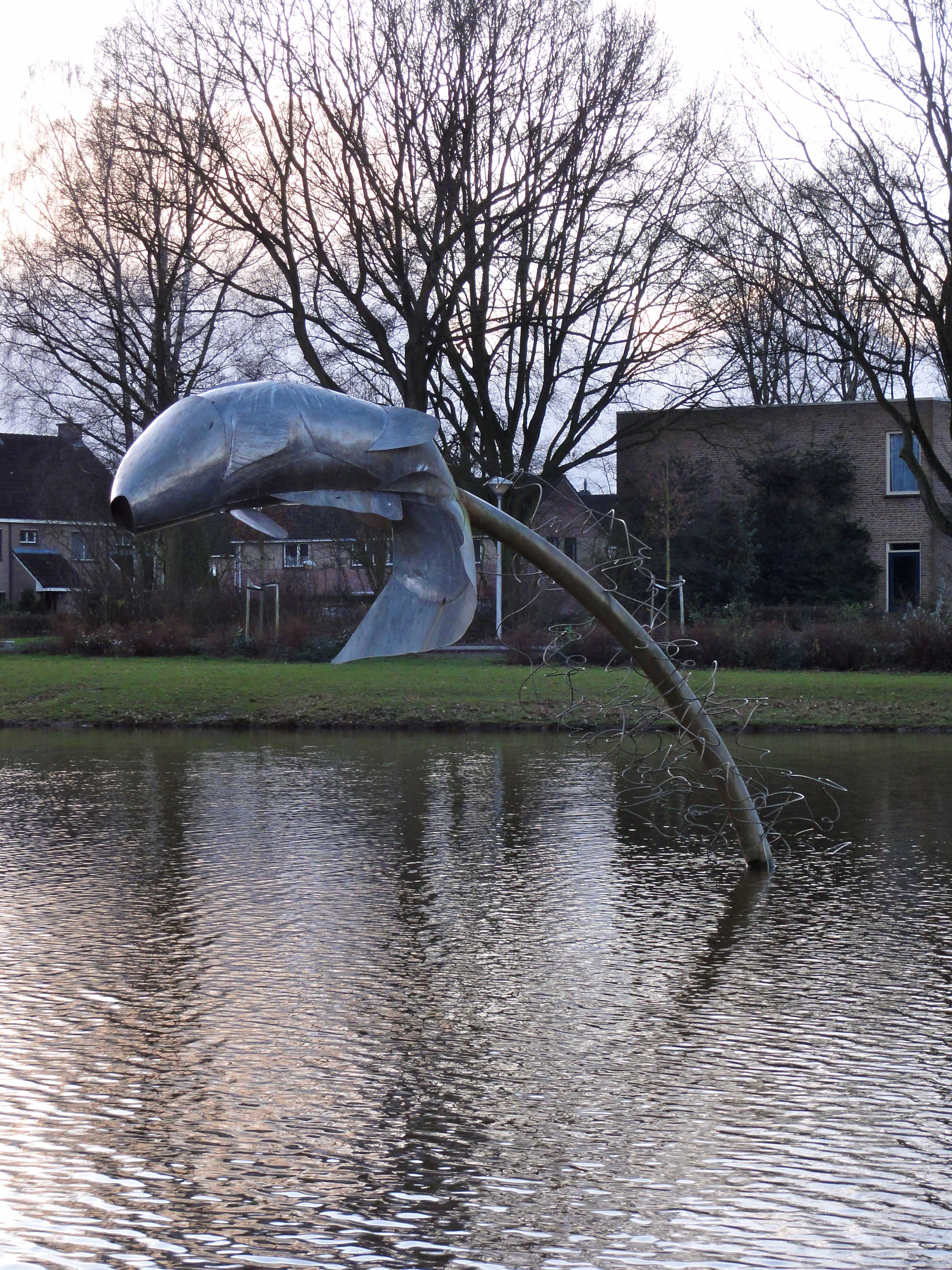 Spiegelkarper door Maria Jeronimus, Paalweg Heino